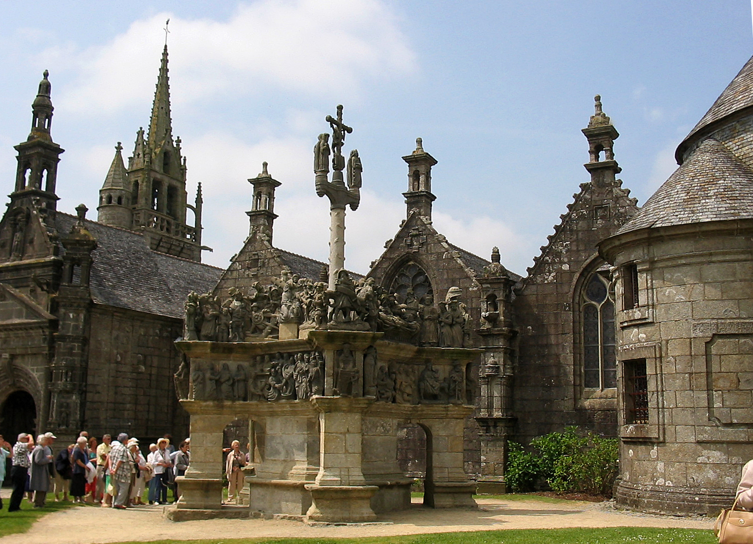 Der umfriedete Pfarrbezirk von Guimiliau, Bretagne, Frankreich